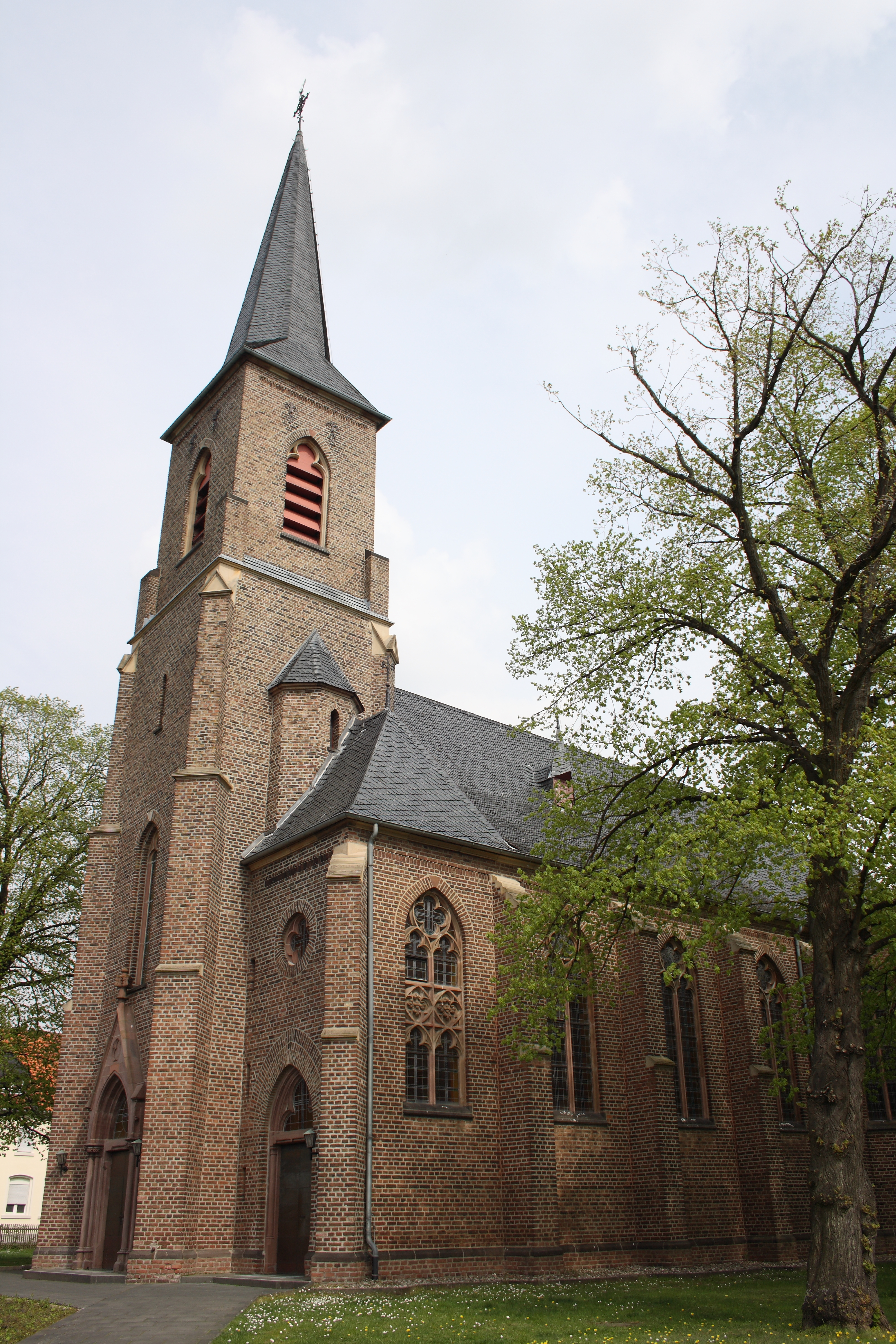 katholischen Pfarrkirche St. Brictius in Euenheim